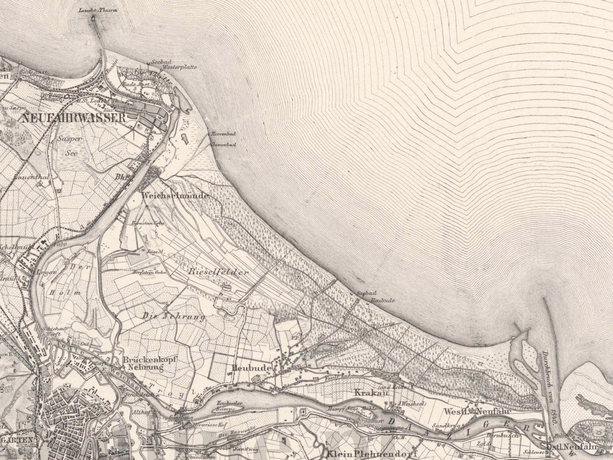 Gdańsk, Wyspa Portowa.